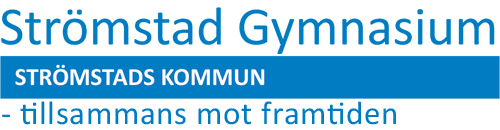 Logotyp med ledord Strömstad Gymnasium